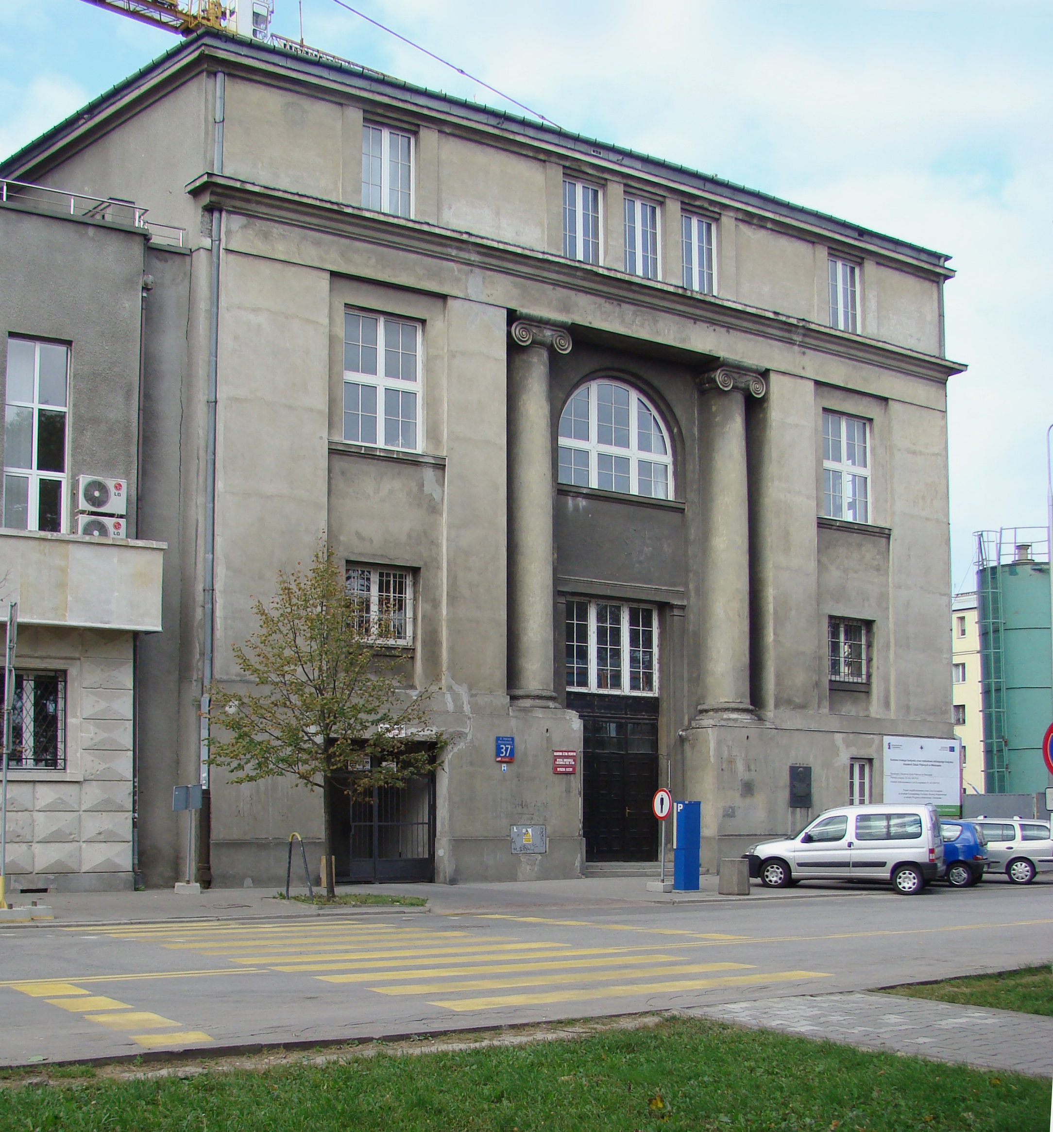 Akademia Sztuk Pięknych w Warszawie, Wydziały Rzeźby i Konserwacji Zabytków, Wybrzeże Kościuszkowskie 37, arch. Alfons Emil Gravier, 1912-1914